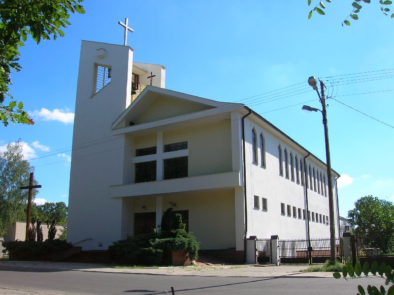 Kościół Świętego Maksymiliana Kolbe w Głownie.